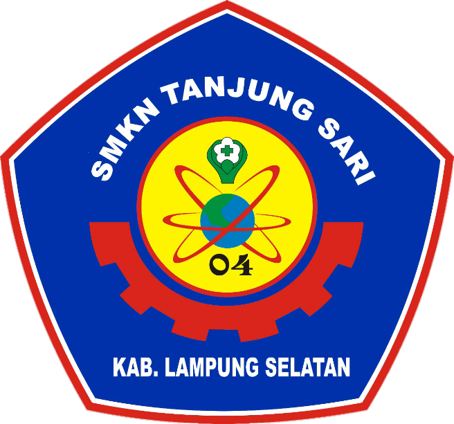 Logo SMK Negeri Tanjungsari Lampung Selatan